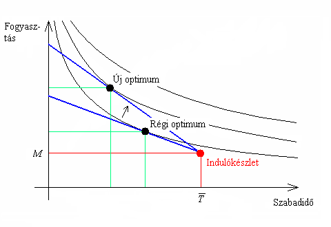 Bérnövekedés hatása